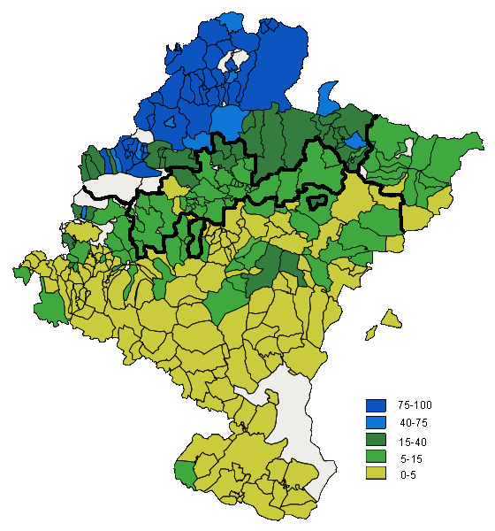 Vascuencearen Foru Legearen banaketa udalerrika eta udalerri bakoitzeko 2001eko euskara ongi hitz egiten duten pertsona kopuruaren arteko konparaketa.